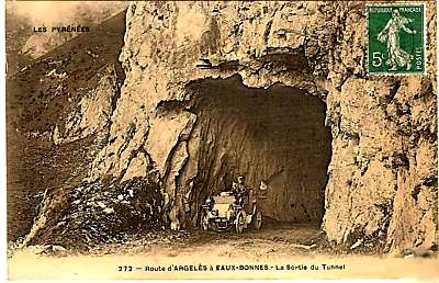 = Summary == Description Route thermale des pyrénées- France DateJuly 2008Sourcescan from old documentAuthorP.Charpiat Licensing This work is in the public domain in its country of origin and other countries and areas where the copyright term is the author's life plus 70 years or less. You must also include a United States public domain tag to indicate why this work is in the public domain in the United States. Note that a few countries have copyright terms longer than 70 years: Mexico has 100 years, Colombia has 80 years, and Guatemala and Samoa have 75 years. This image may not be in the public domain in these countries, which moreover do not implement the rule of the shorter term. Côte d'Ivoire has a general copyright term of 99 years and Honduras has 75 years, but they do implement the rule of the shorter term. Copyright may extend on works created by French who died for France in World War II (more information), Russians who served in the Eastern Front of World War II (known as the Great Patriotic War in Russia) and posthumously rehabilitated victims of Soviet repressions (more information). This file has been identified as being free of known restrictions under copyright law, including all related and neighboring rights. Route thermale des pyrénées- France